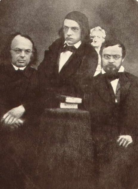 1848 - Leipzig - Gruppenbild, Theodor Mommsen (Mitte) mit seinen Leipziger Kollegen, den Professoren Moritz Haupt und Otto Jahn, die Aufnahme ist eine Daguerreotypie